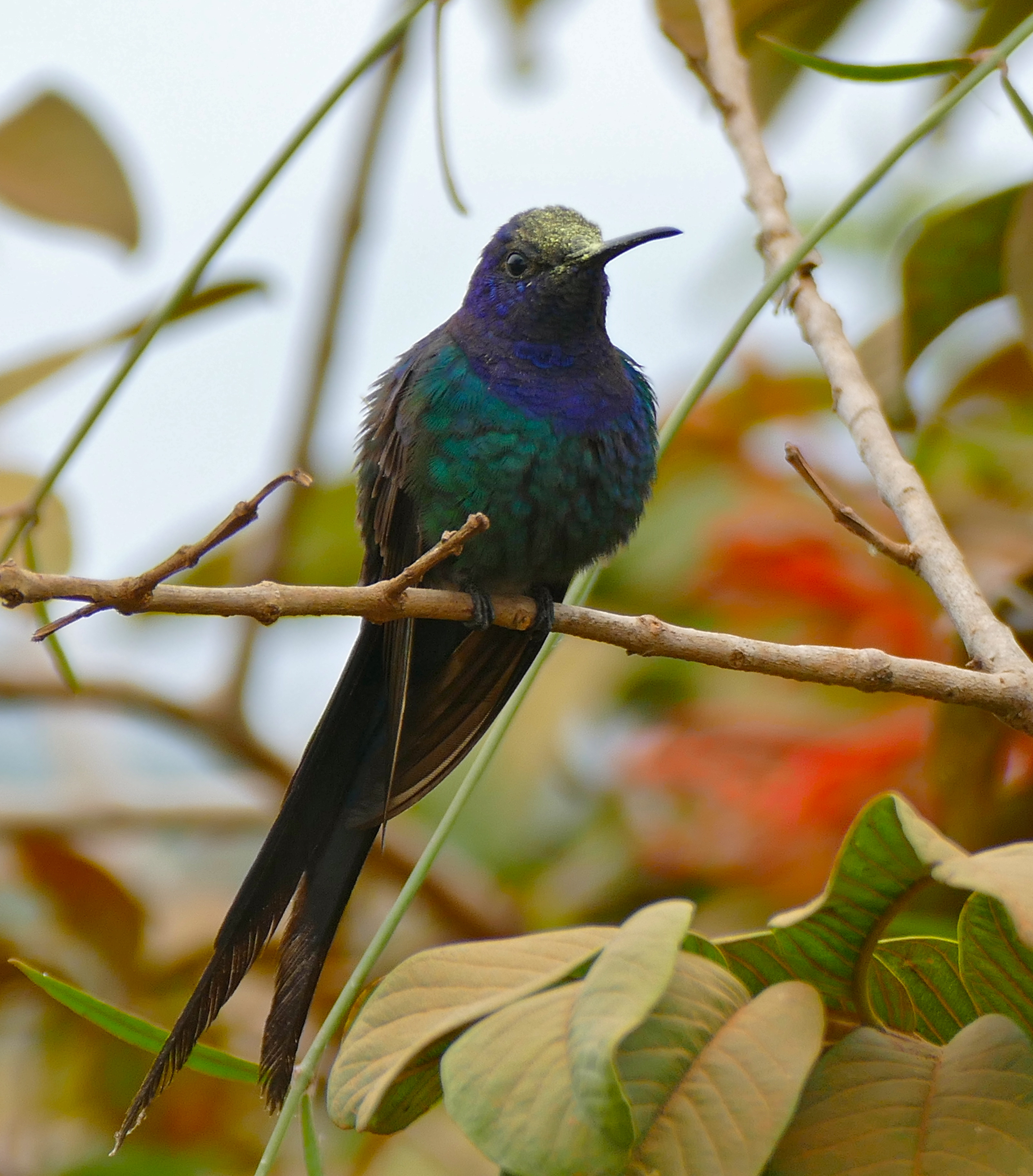 Transpantaneira, Poconé, Mato Grosso, BRAZIL